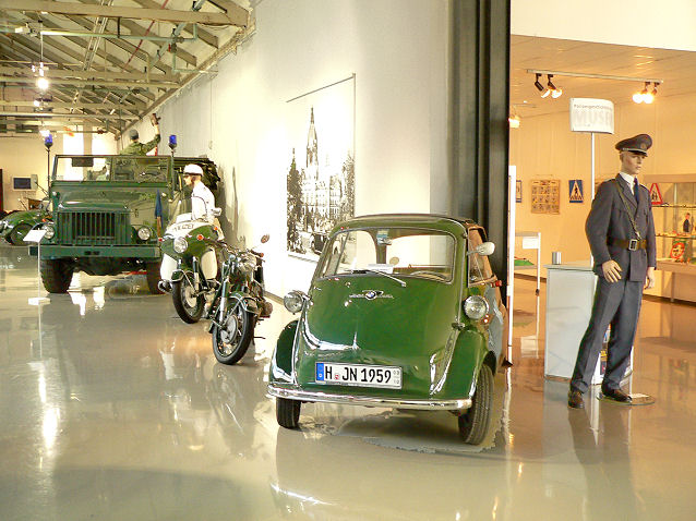 Ausstellungshalle der Polizeigeschichtlichen Sammlung Niedersachsen in Hannover